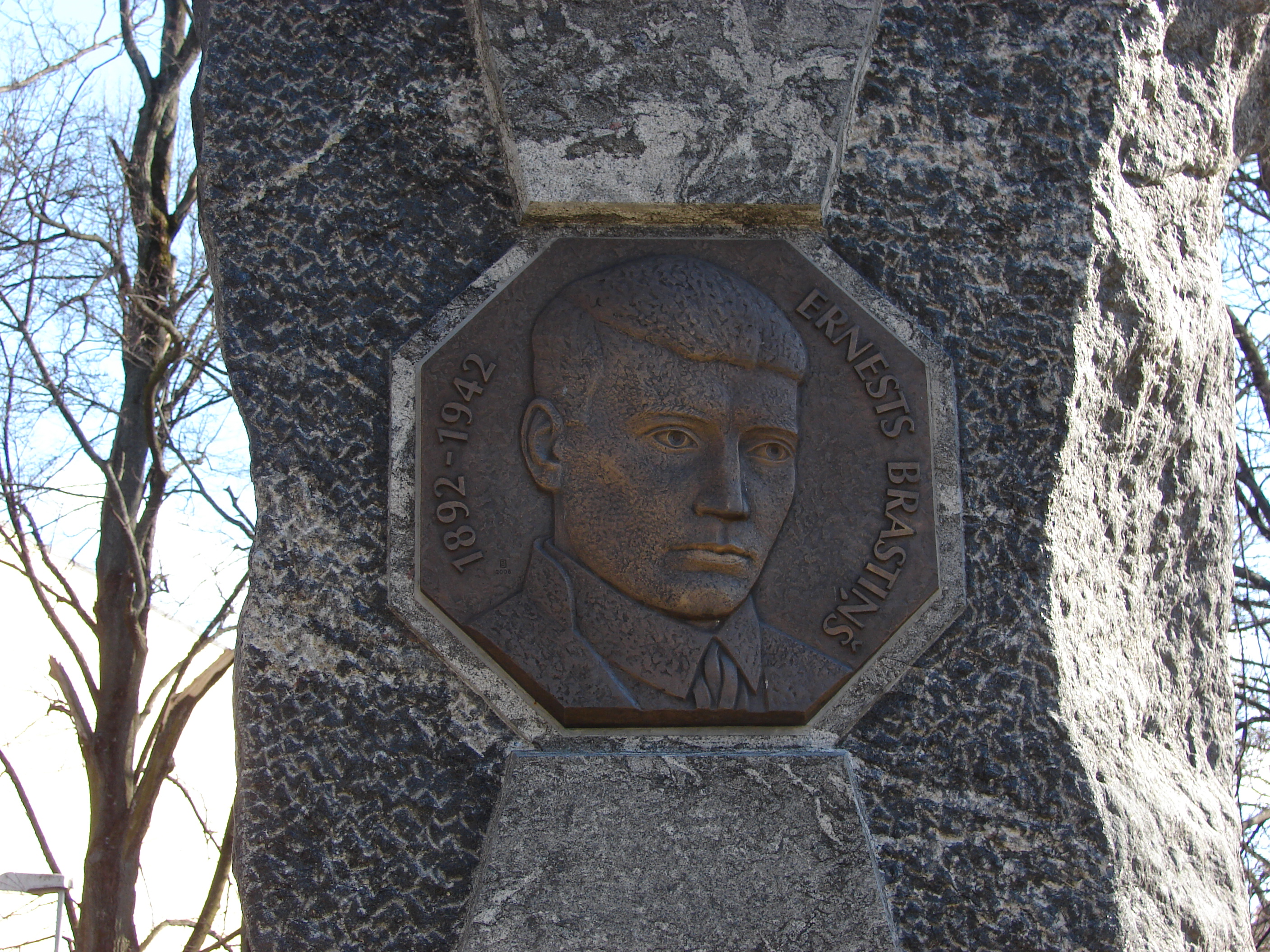 Ernests Brastiņš 1892-1942 (2006.), Kronvalda parks, Rīga, Latvia